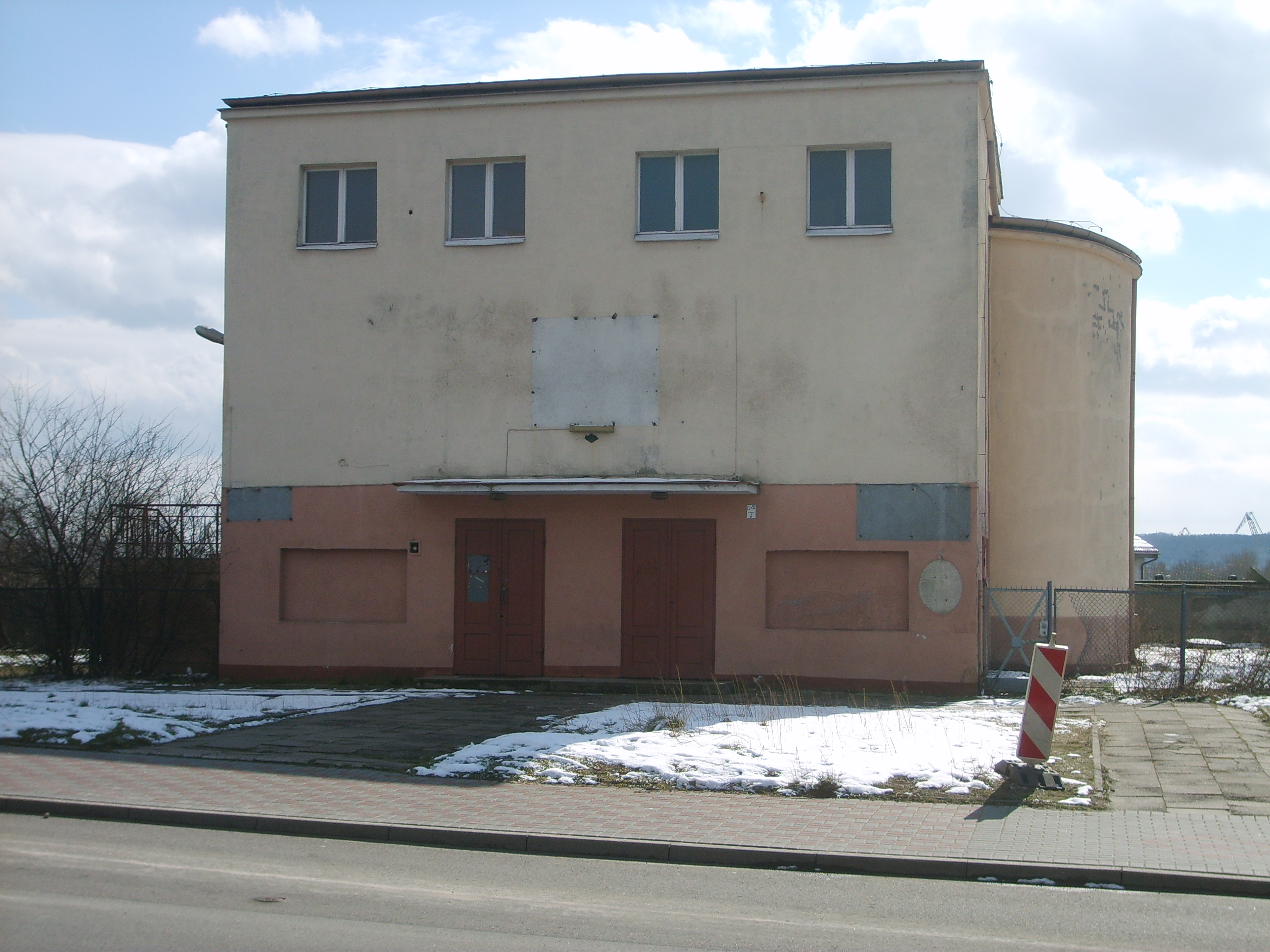 Gdynia Obłuże, budynek po kinie Marynarz, ul. Bosmańska